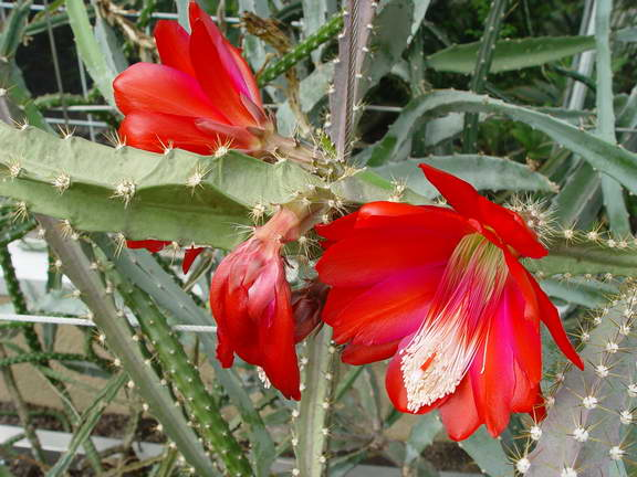 Disocactus speciosus subsp. speciosus